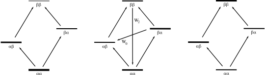 a) Der Gleichgewichtszustand, b) Die Energieniveaus des ersten Kerns werden durch die Sättigung gleichbesetzt, die dipolare Kopplung mit Umgebungskernen ermöglicht die Übergänge W0 und W2, c) Änderung der Intensität des zweiten Kerns